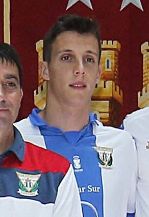 Felicidades pepineros!! Vuestro ascenso a Primera es la historia de un sueño, el resultado de vuestro trabajo y esfuerzo. Sois un orgullo para todo Madrid! Enhorabuena CD Leganés. #LeganésEsDePrimera